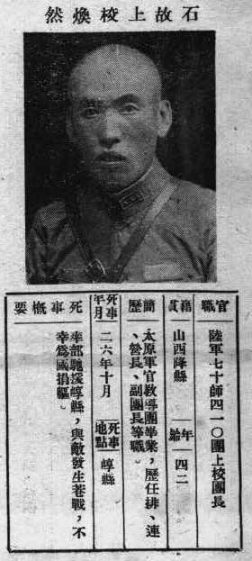 中文（台灣）: 抗戰軍人忠烈錄第一輯中的烈士遺像